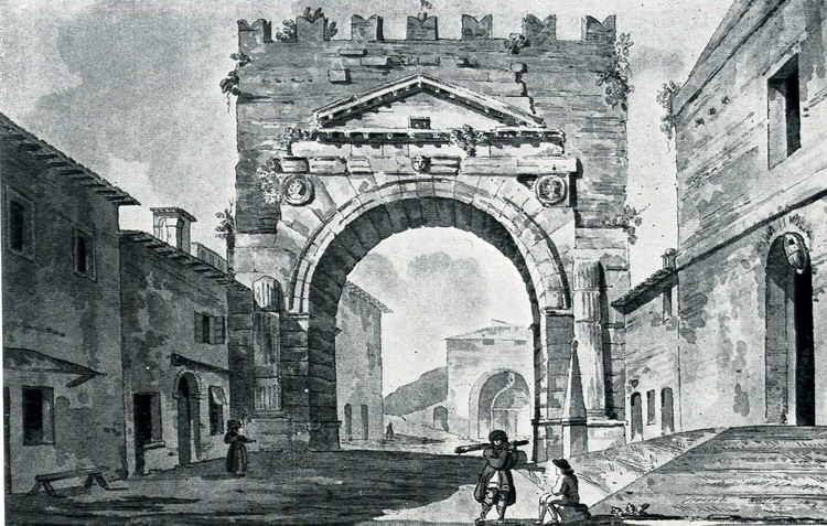 Ріміні арка: малюнок арки імператора Августа, Ріміні